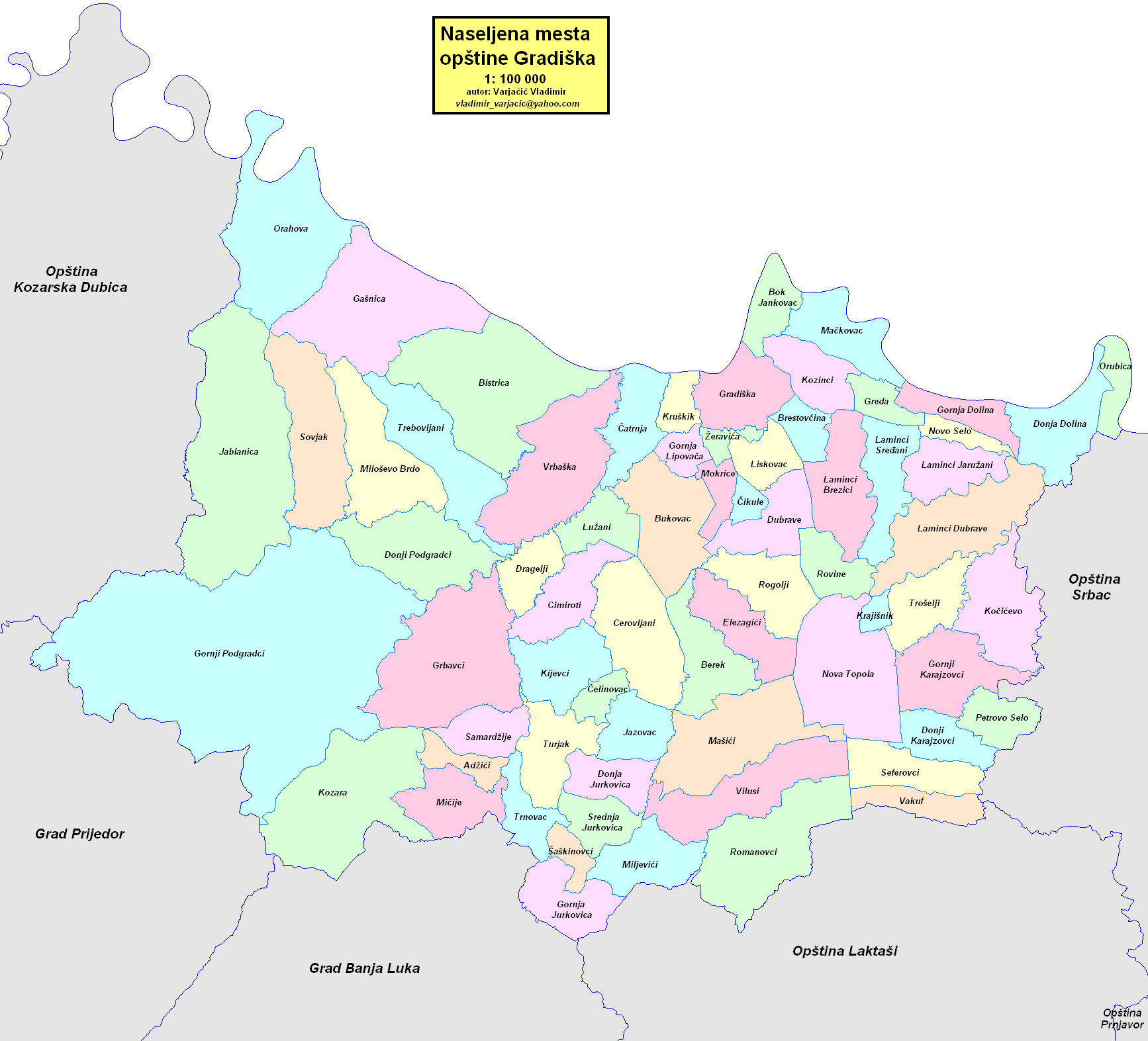 Opština Gradiška